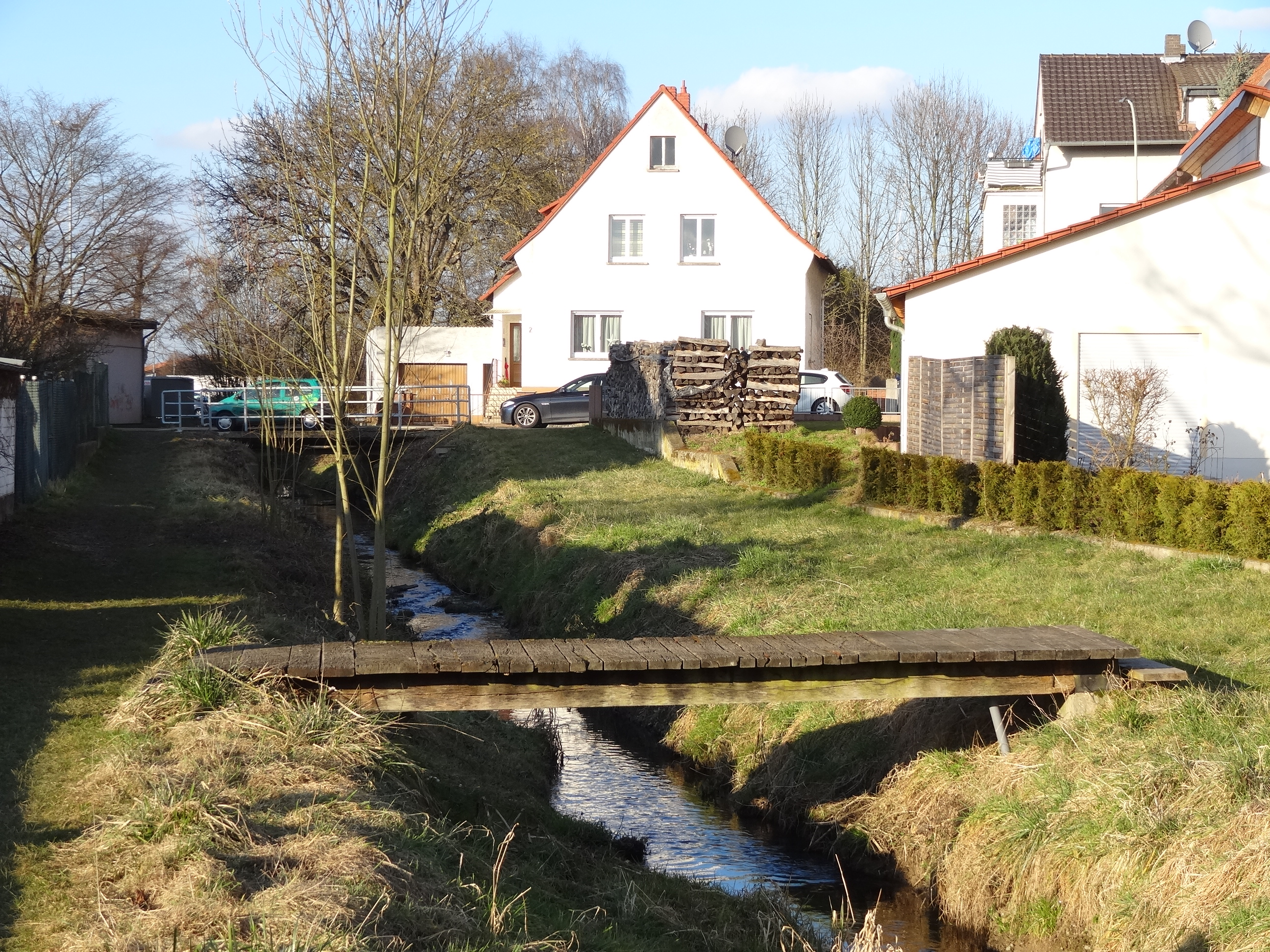 Dießenbach (Kleebach)